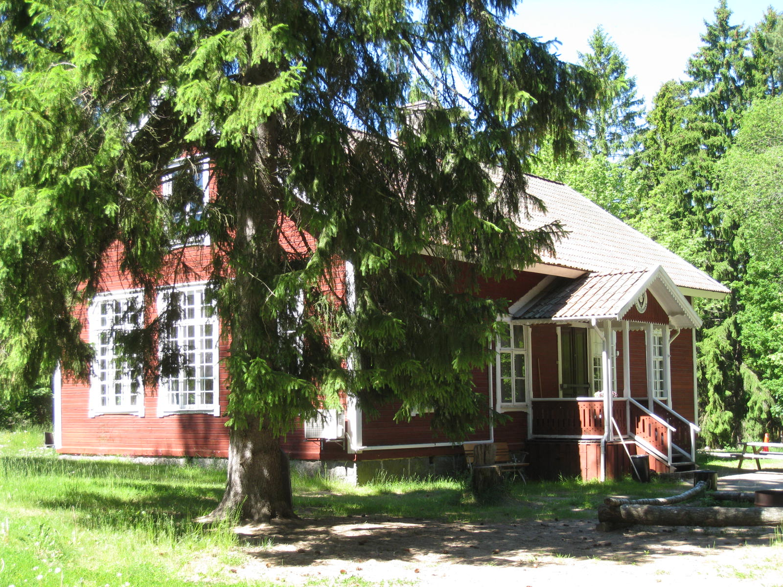 Görvälns skola i Järfälla, Stockholms län, byggdes 1896 och var i bruk som skola till 1939. Sedan 1994 ägs Görvälns gamla skola av föreningen Motorcykelentusiasterna.